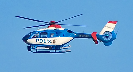 Polishelikopter